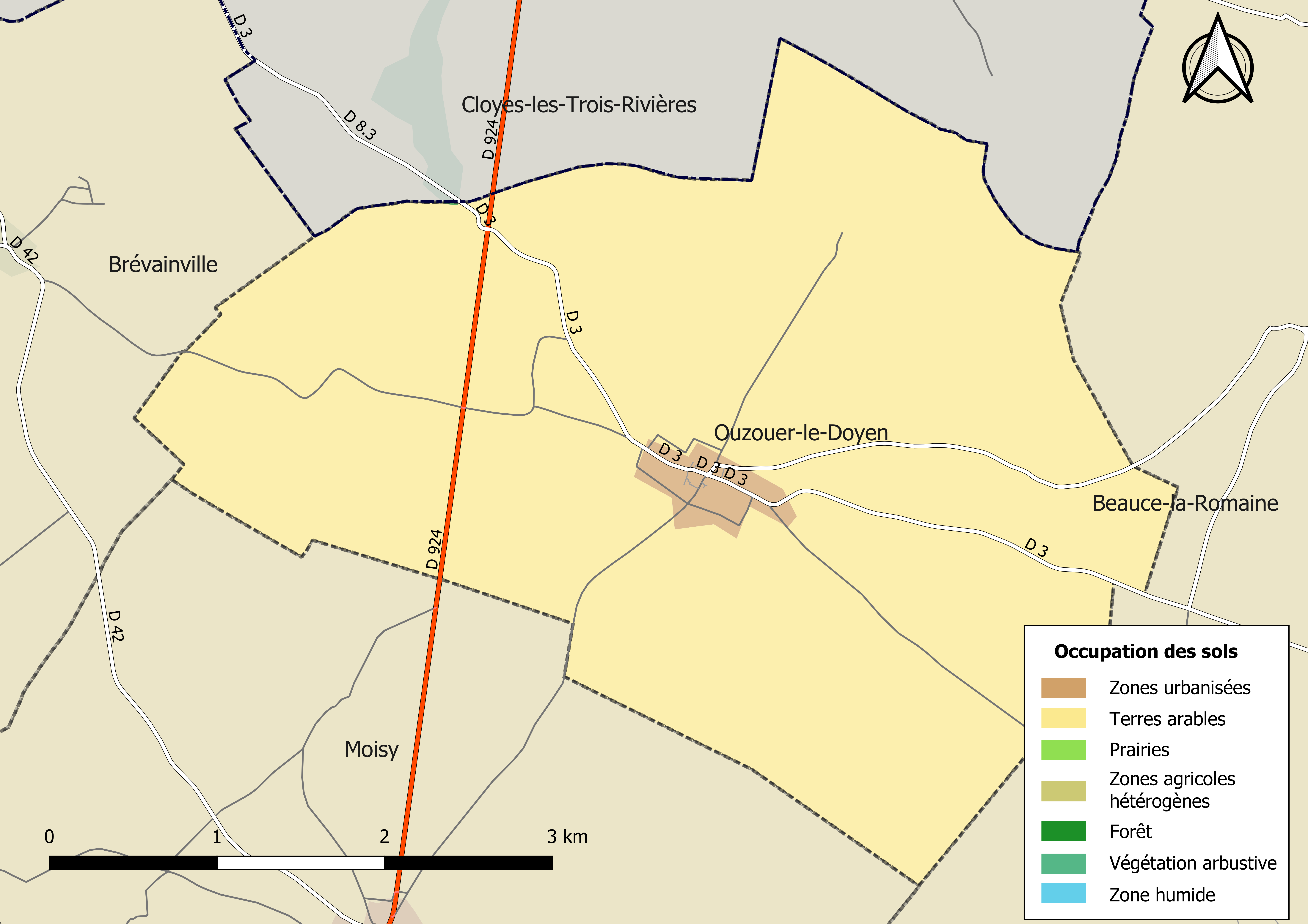 Carte des infrastructures et de l’occupation des sols en 2018 de la commune de Ouzouer-le-Doyen (France).